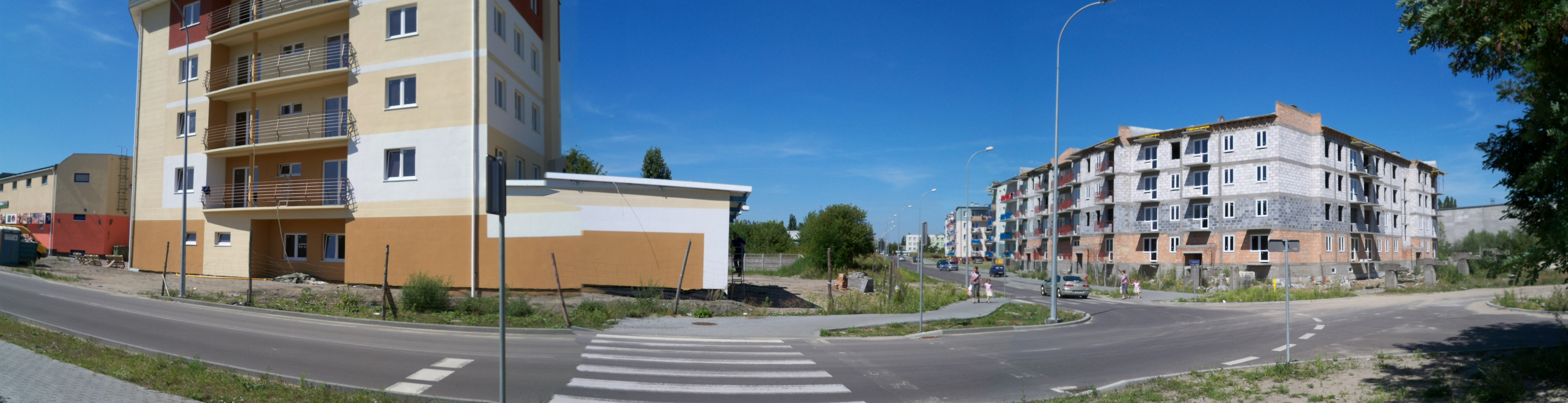 Nowe bloki przy ul. Celulozowej (2009 r.)